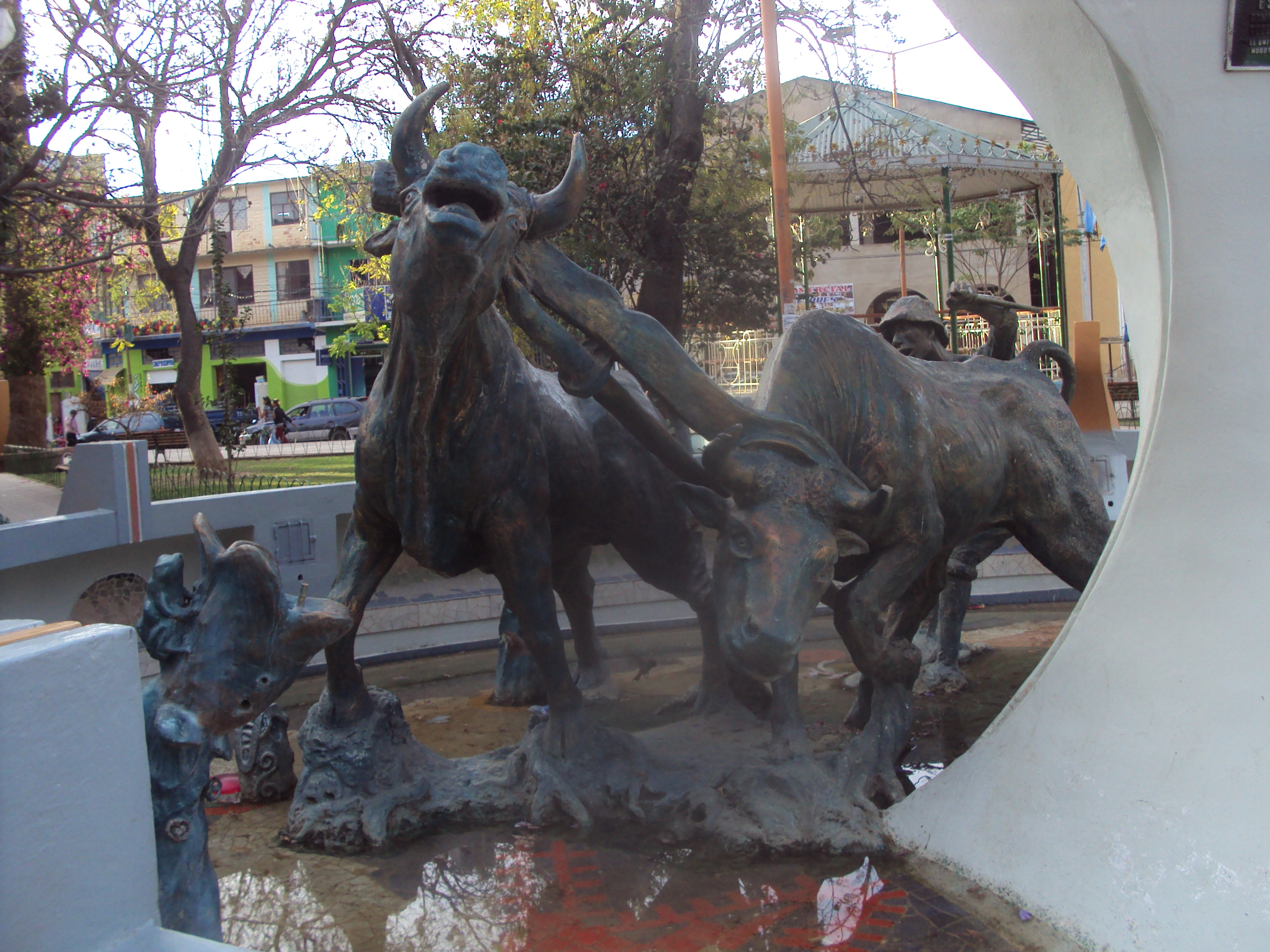 Representa la fuerza de trabajo y un simbolo de lo que es Cliza